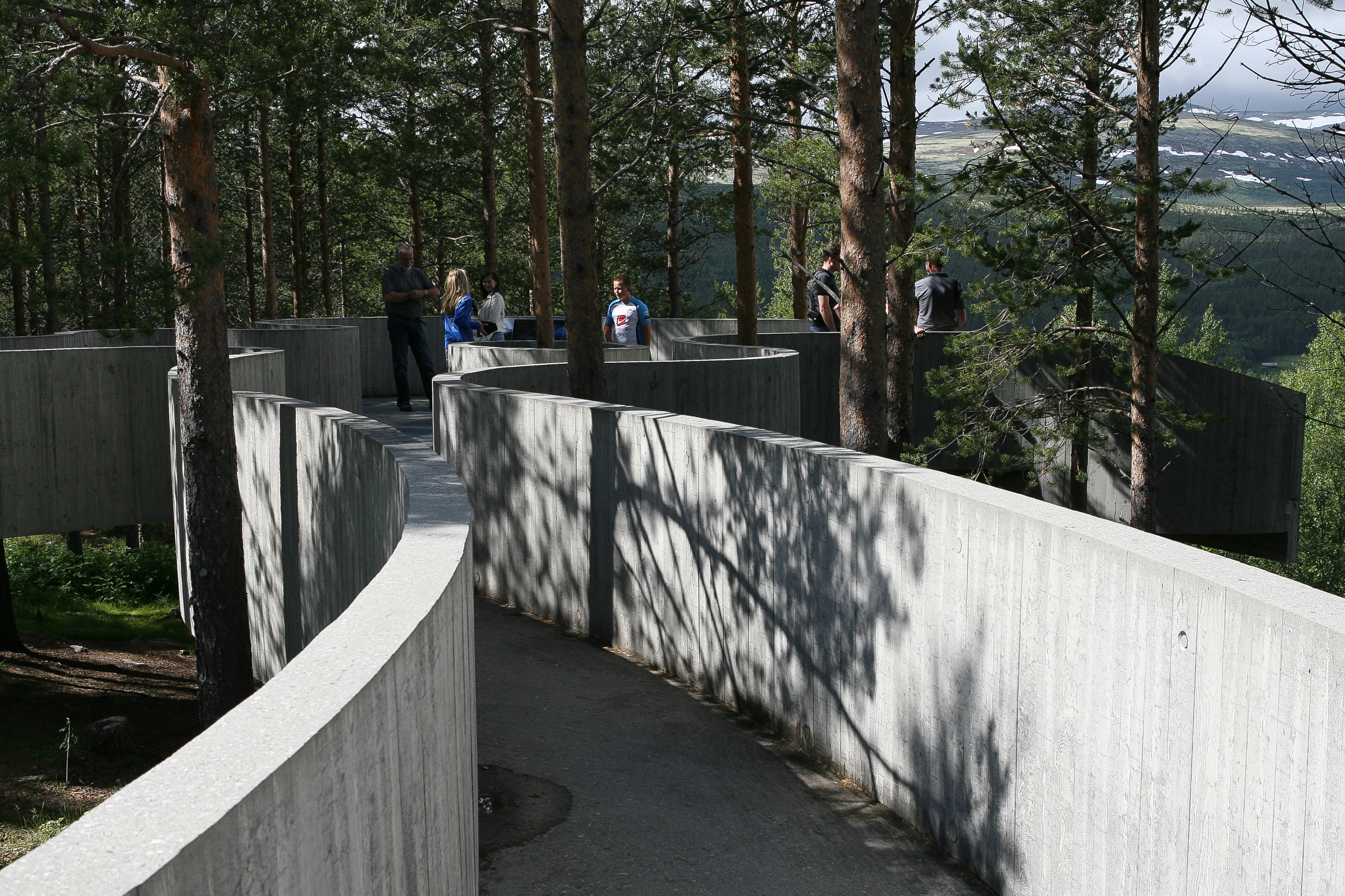 Sohlbergplassen ved fylkesveg 27 ved Stor-Elvdal/Sør-Fron.